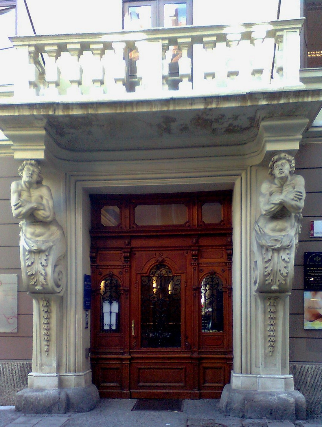 Palais Stubenberg, Graz, Portal